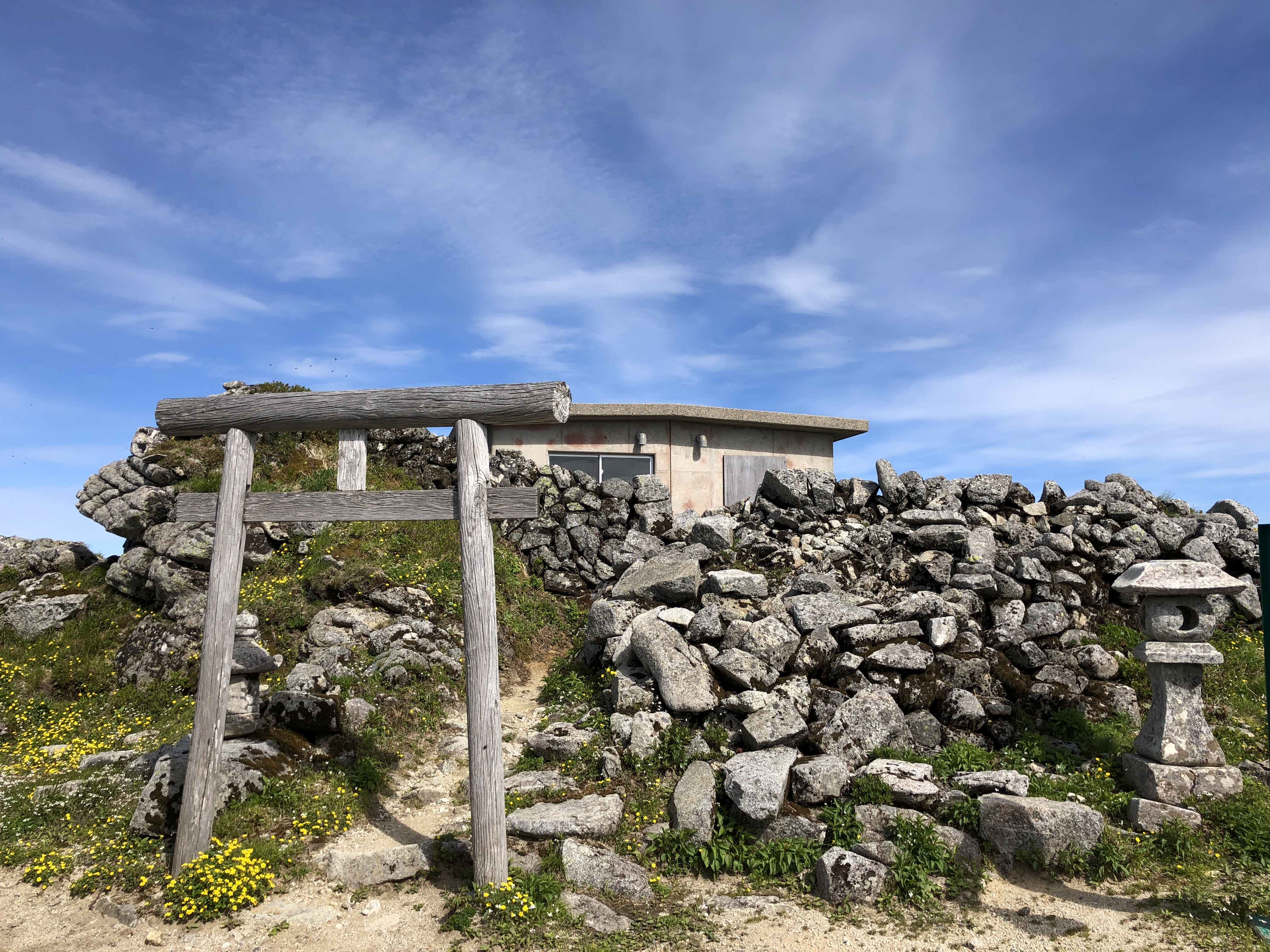 本山小屋付近